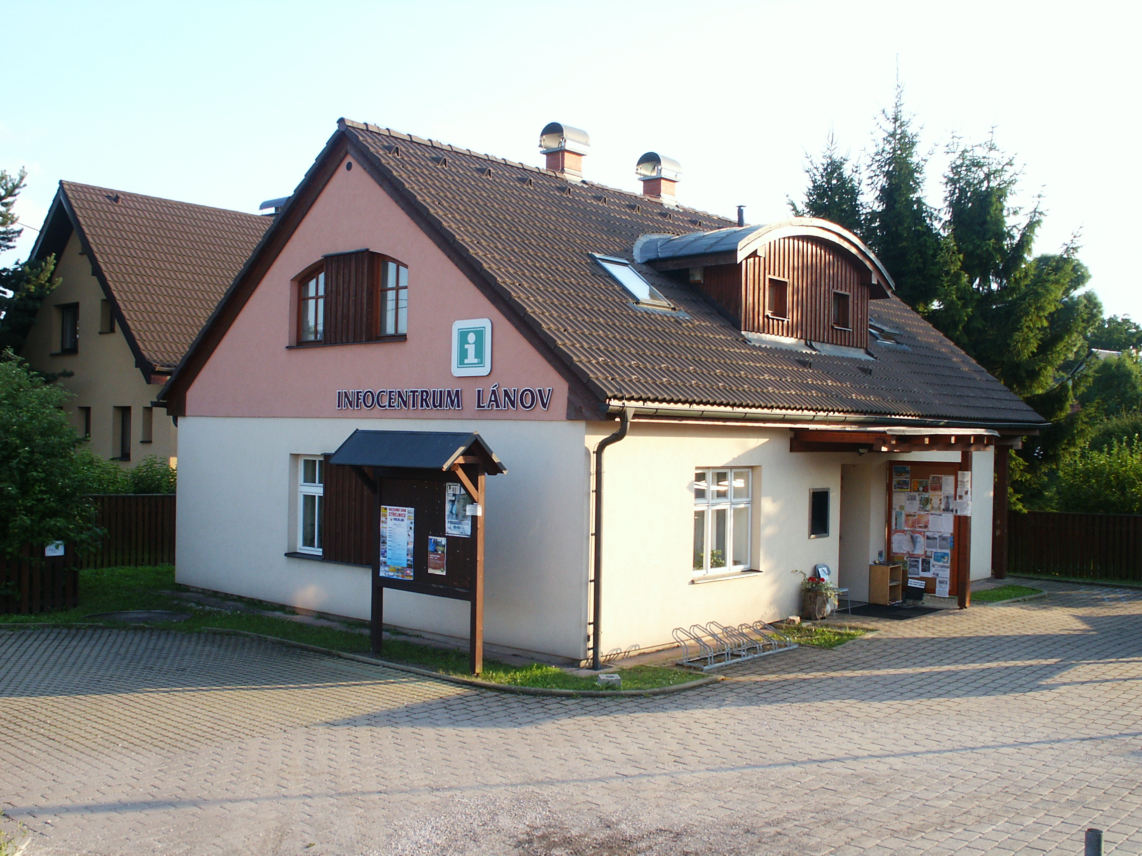 Prostřední Lánov - infocentrum (č.p. 39)